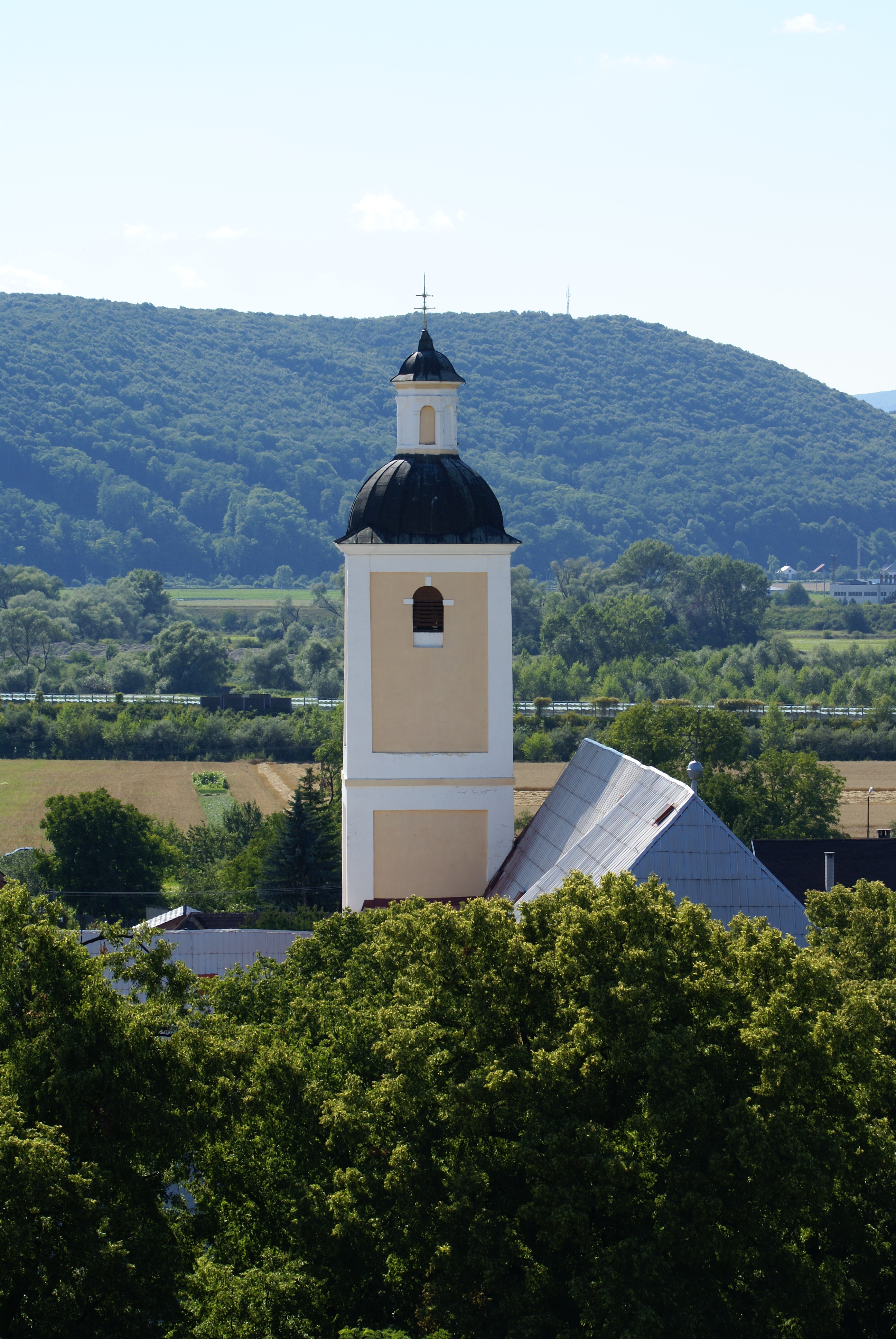 Beckov Castle, Slovak Republic